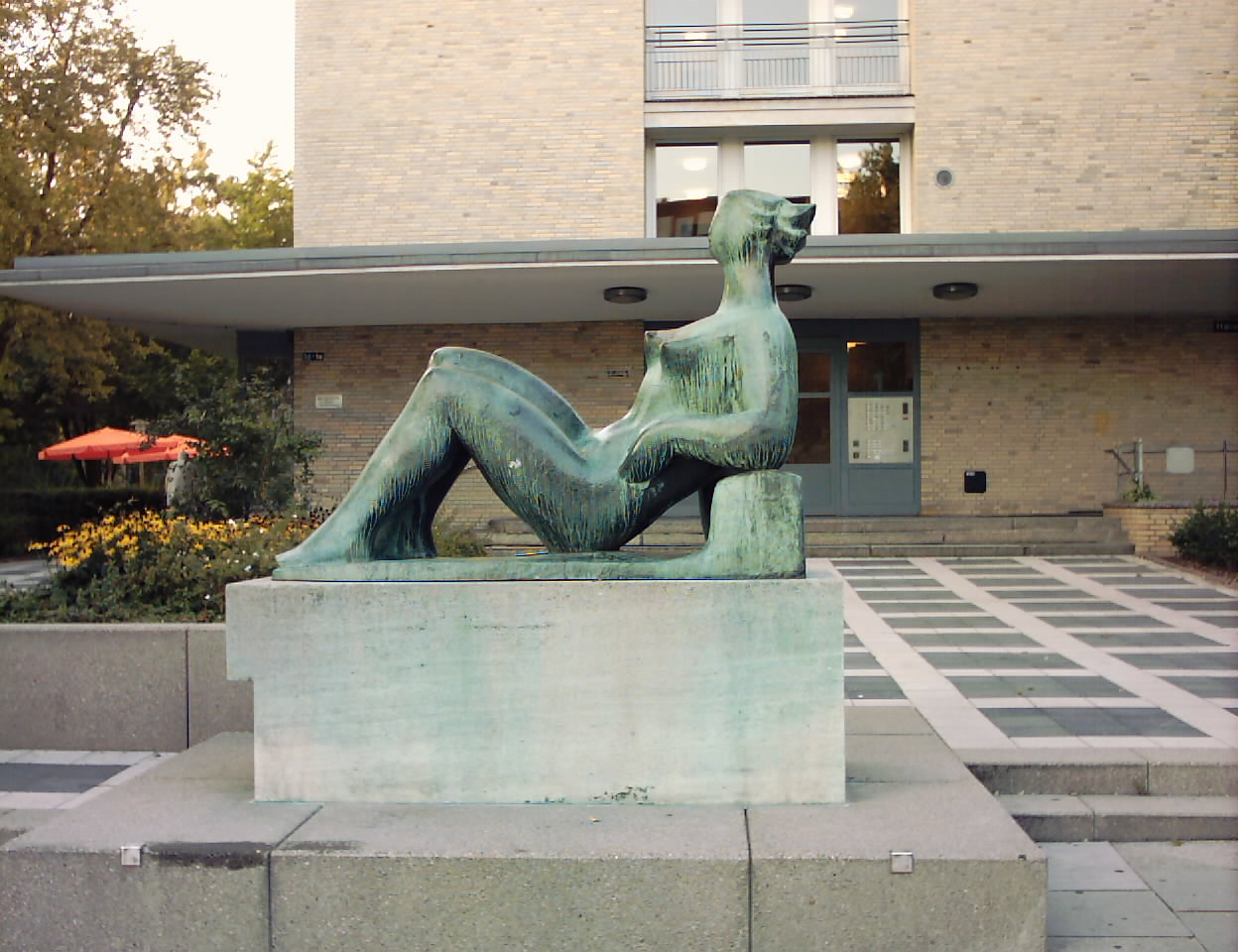 Grindelhochhäuser, Hamburg-Harvestehude, Plastik: Große Liegende von Barbara Haeger, 1956.